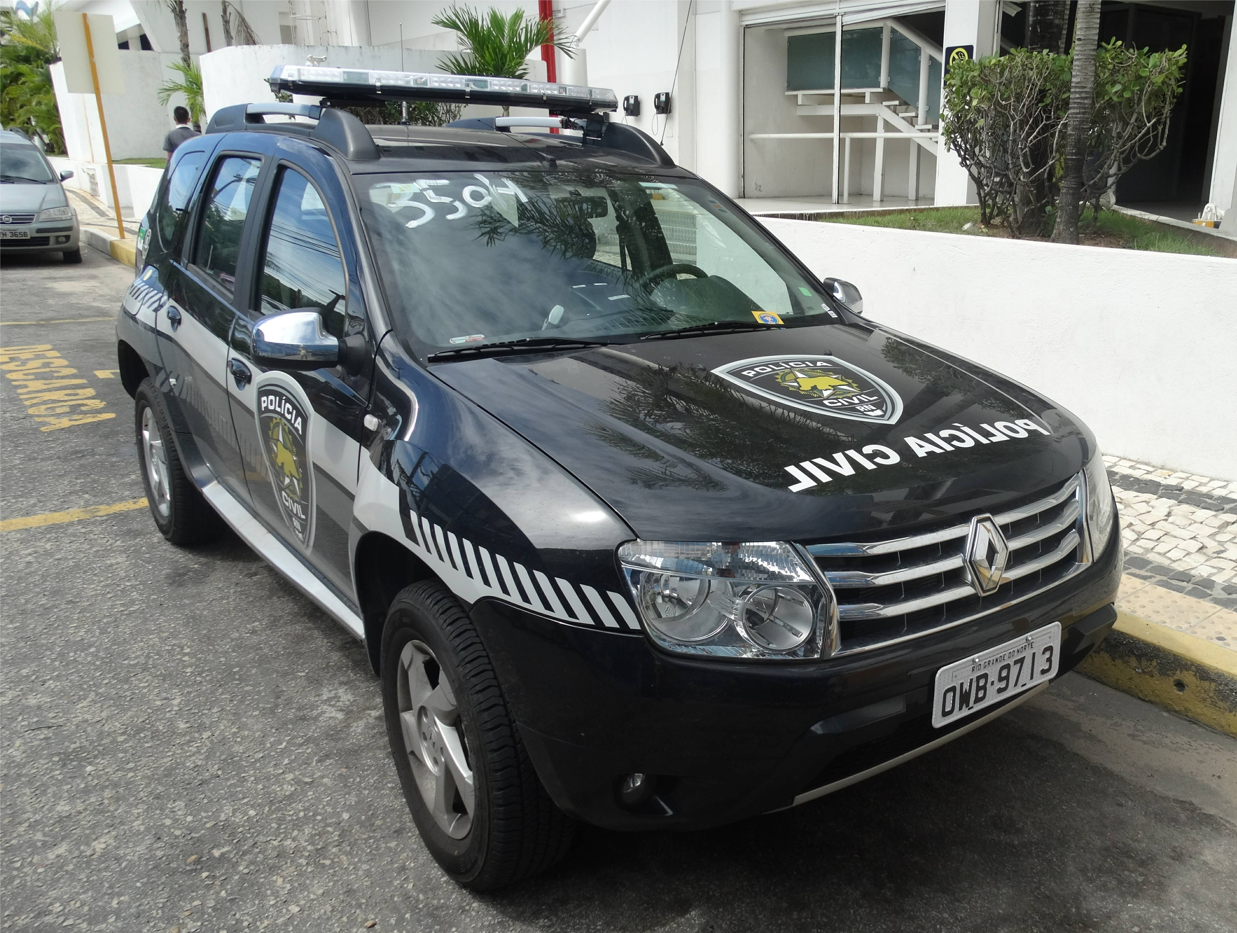 Rio Grande do Norte State police car - Brasil